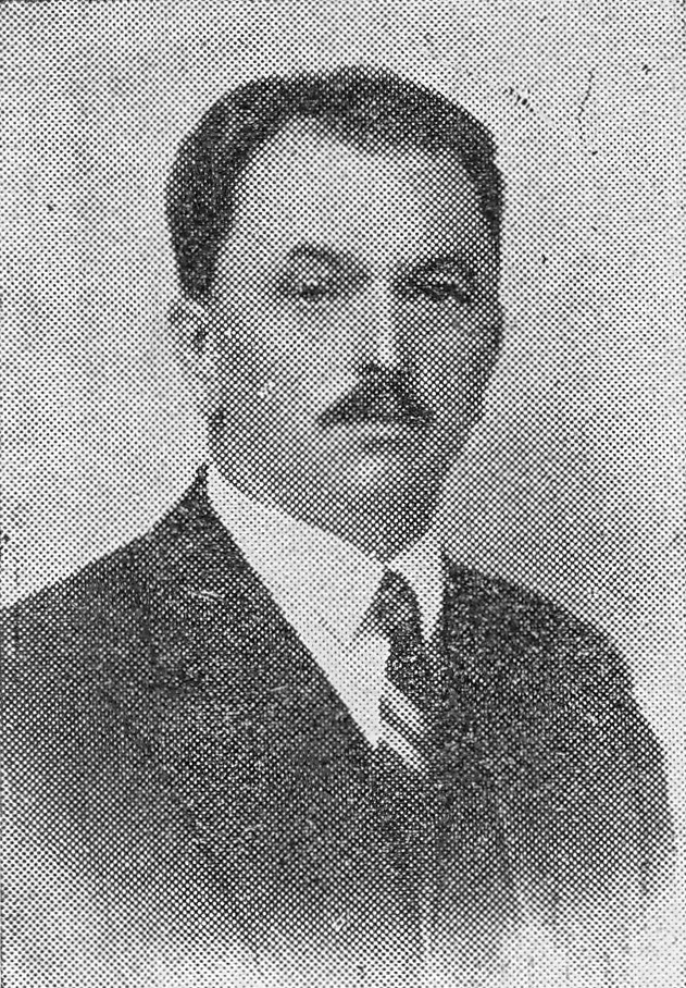 Poseł na Sejm IV kadencji (1935–1938) II Rzeczypospolitej